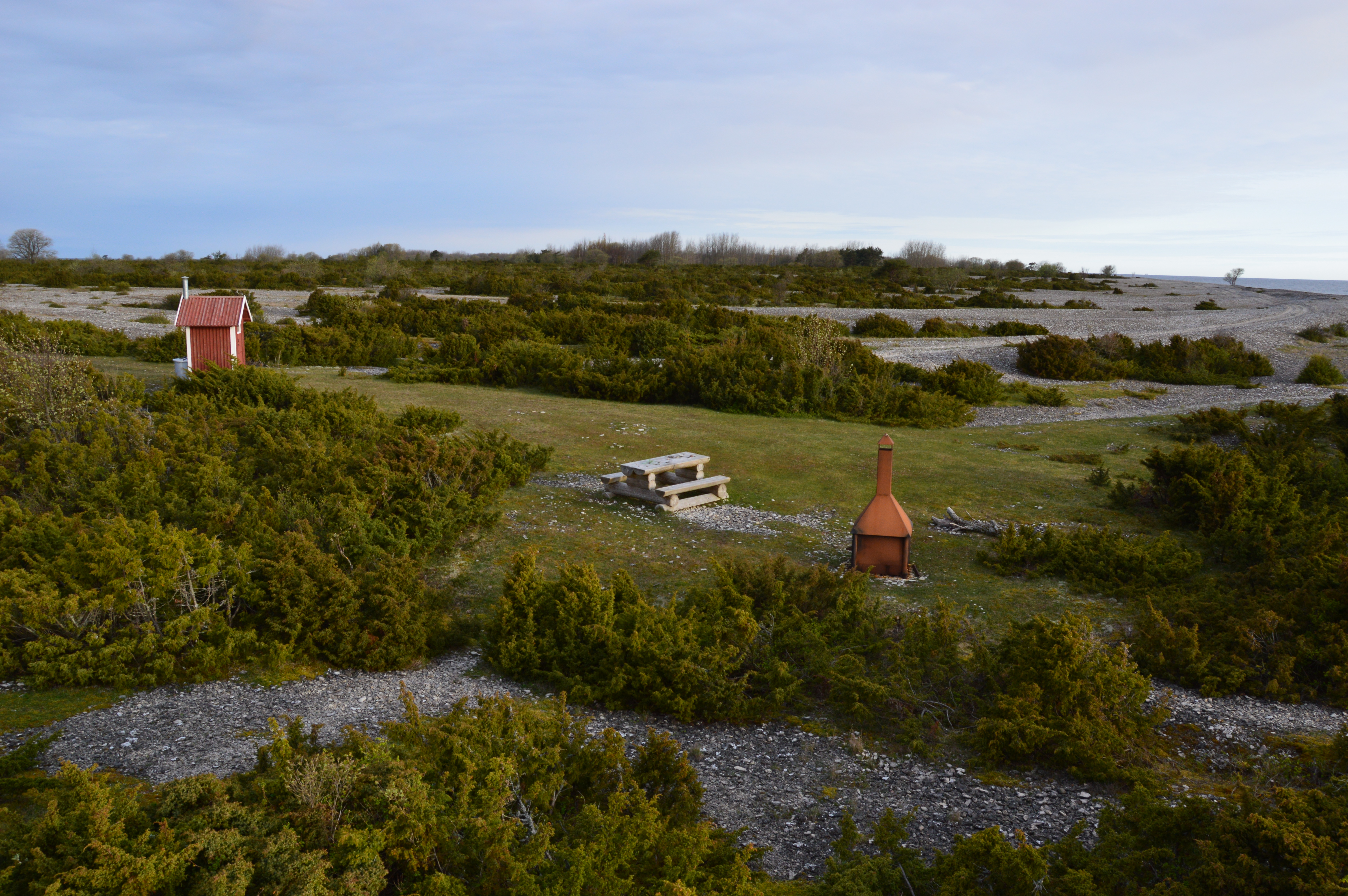 RMK laagriplats Osmussaarel.